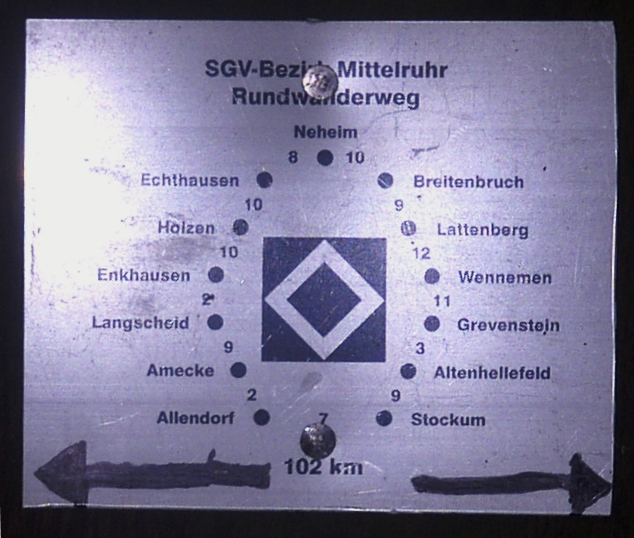 Wegzeichen Bezirksrungweg